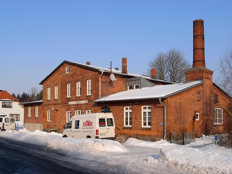 Alte Molkerei in Alt Bukow